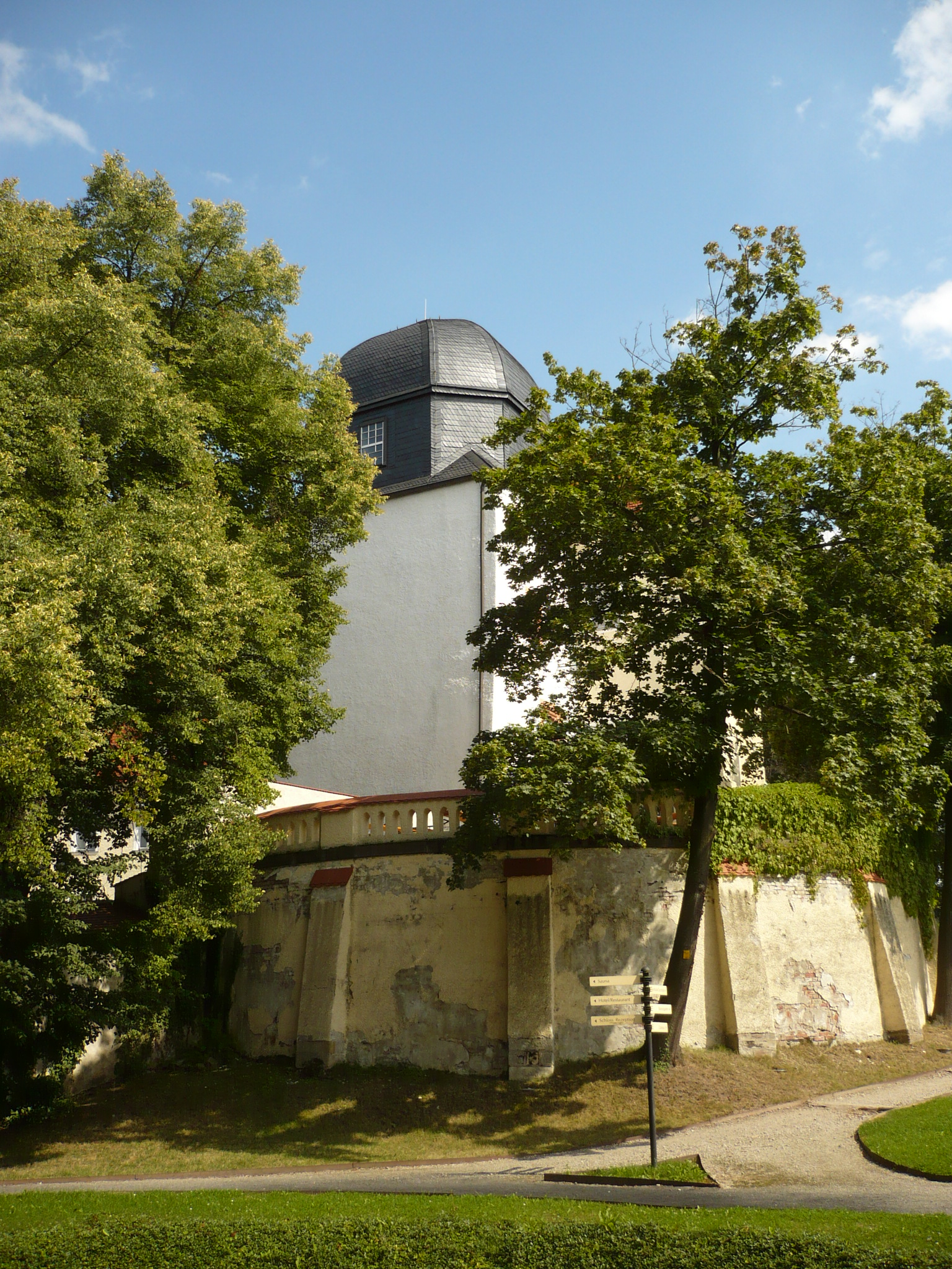 Wieża Zamku Schweinsburg w Neukirchen Pleiße